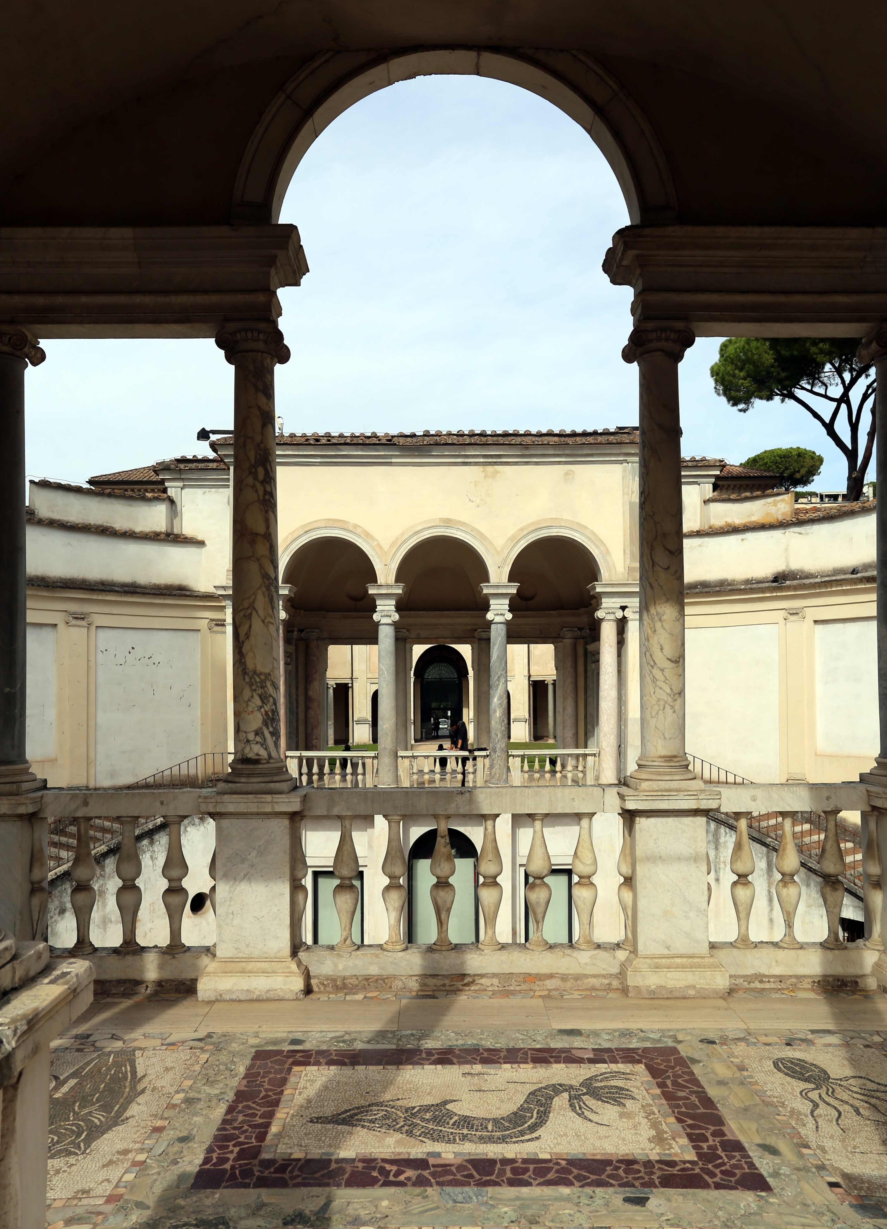 Villa Giulia (Rome) This is a photo of a monument which is part of cultural heritage of Italy.